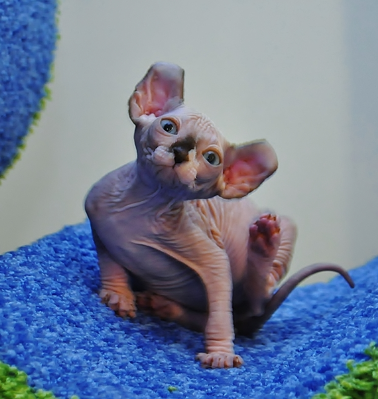 Двельф Galaxy murmulet